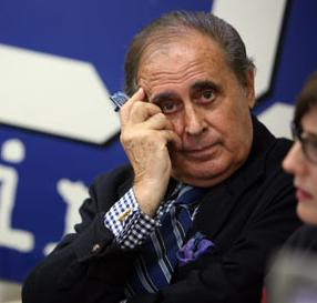 Jaime Peñafiel en la redacción de 20 Minutos.